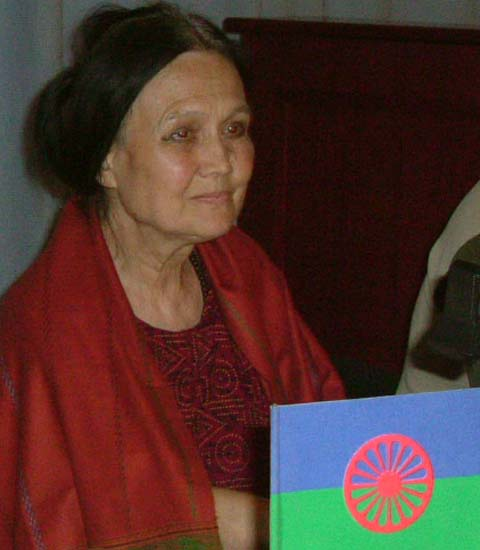 Milena Hübschmannová během veřejné besedy o Romech v roce 2004. V pravém dolním rohu vidíme romskou vlajku. Zdroj: Jakub Krčík/Chuck Dilin